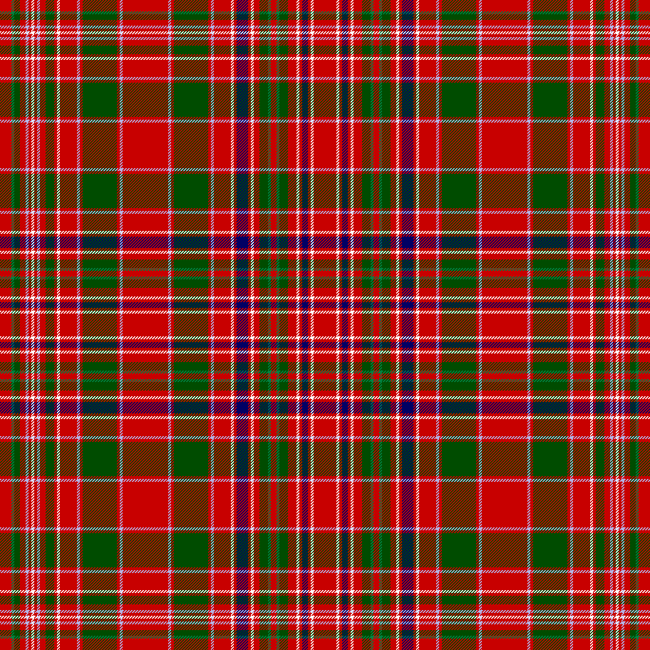 MacAlister tartan. Thread count: R16 Lg2 Dg4 R4 Az2 R2 W2 R2 Az2 R4 Dg6 R2 W2 R12 Az2 R2 Dg24 R2 Az2 R32 Az2 R2 Dg24 R2 Az2 R12 W2 R2 B8 R2 W2 R4 Dg6 Lg2 R4 Lg2 Dg6 R6 W2 R2 B4 R2 W2 R16.